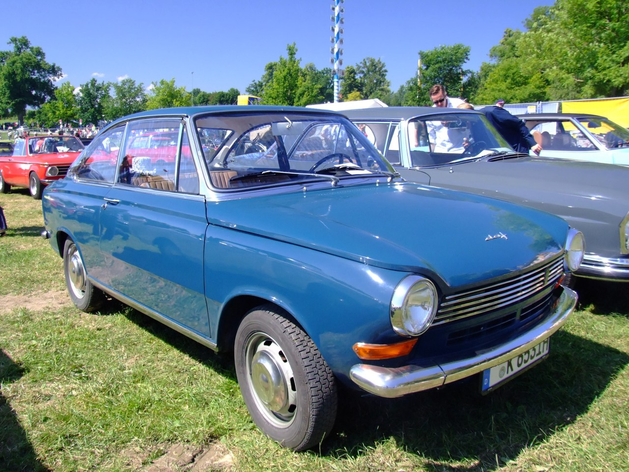 Quelle: selbst fotografiert, 06/2007 Fotograf: Späth Chr.